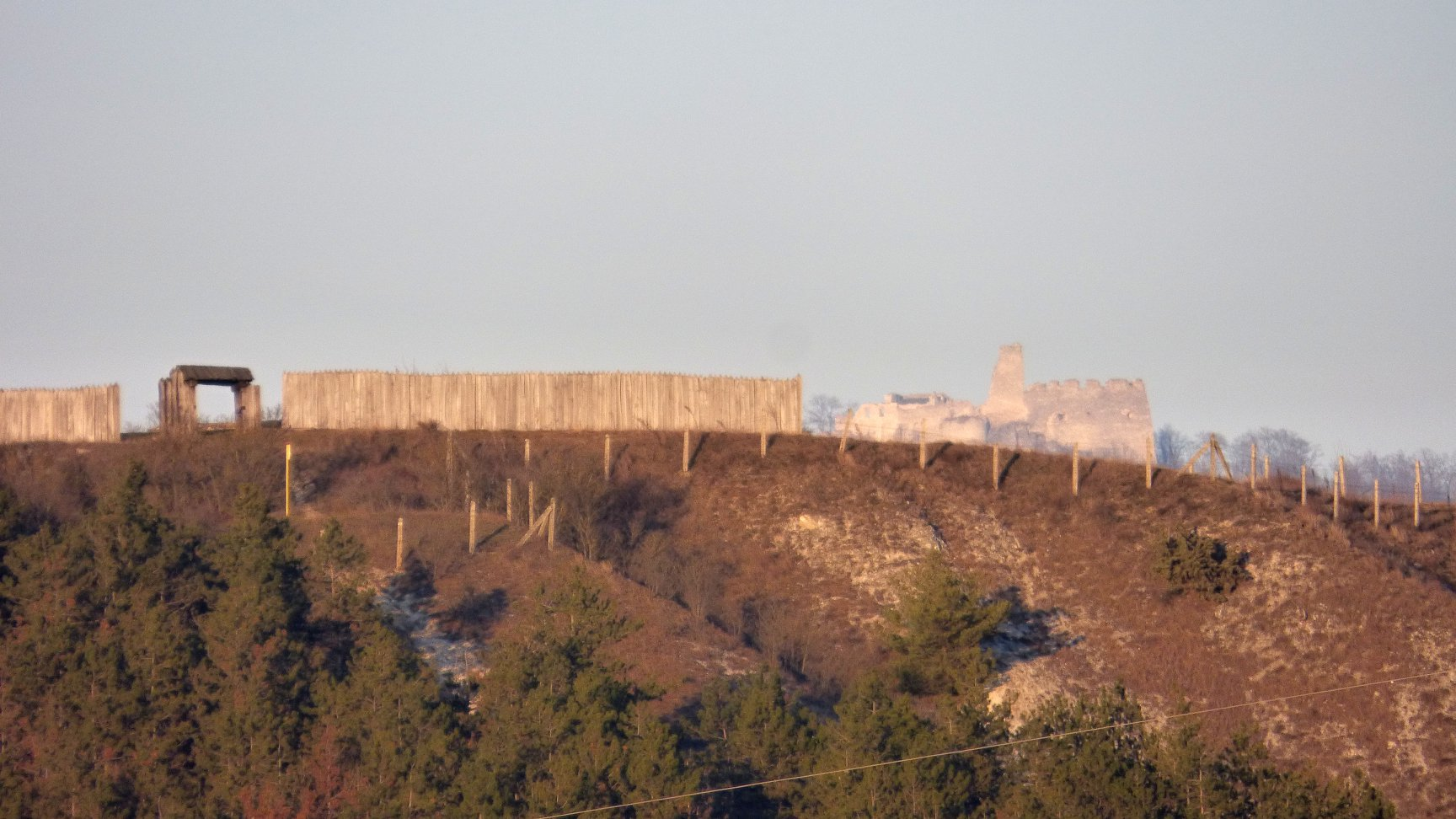 Pohľad na Kostolec a Tematín